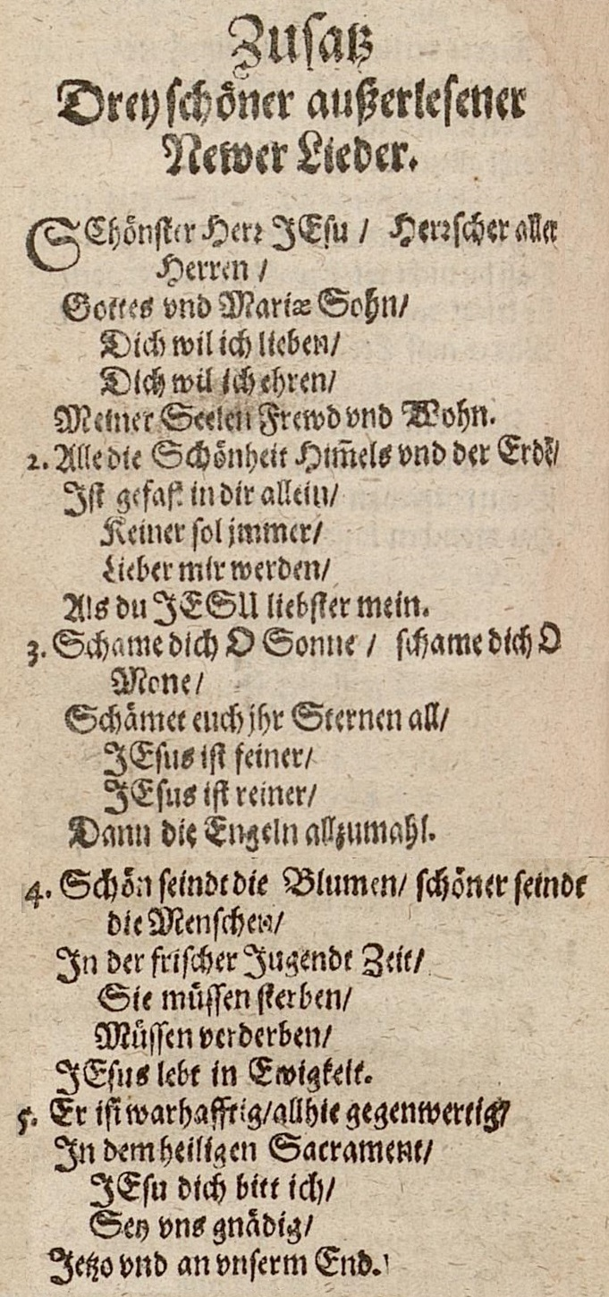 Schönster Herr Jesu, Erstdruck, Münsterisch Gesangbuch 1677, S. 576-577